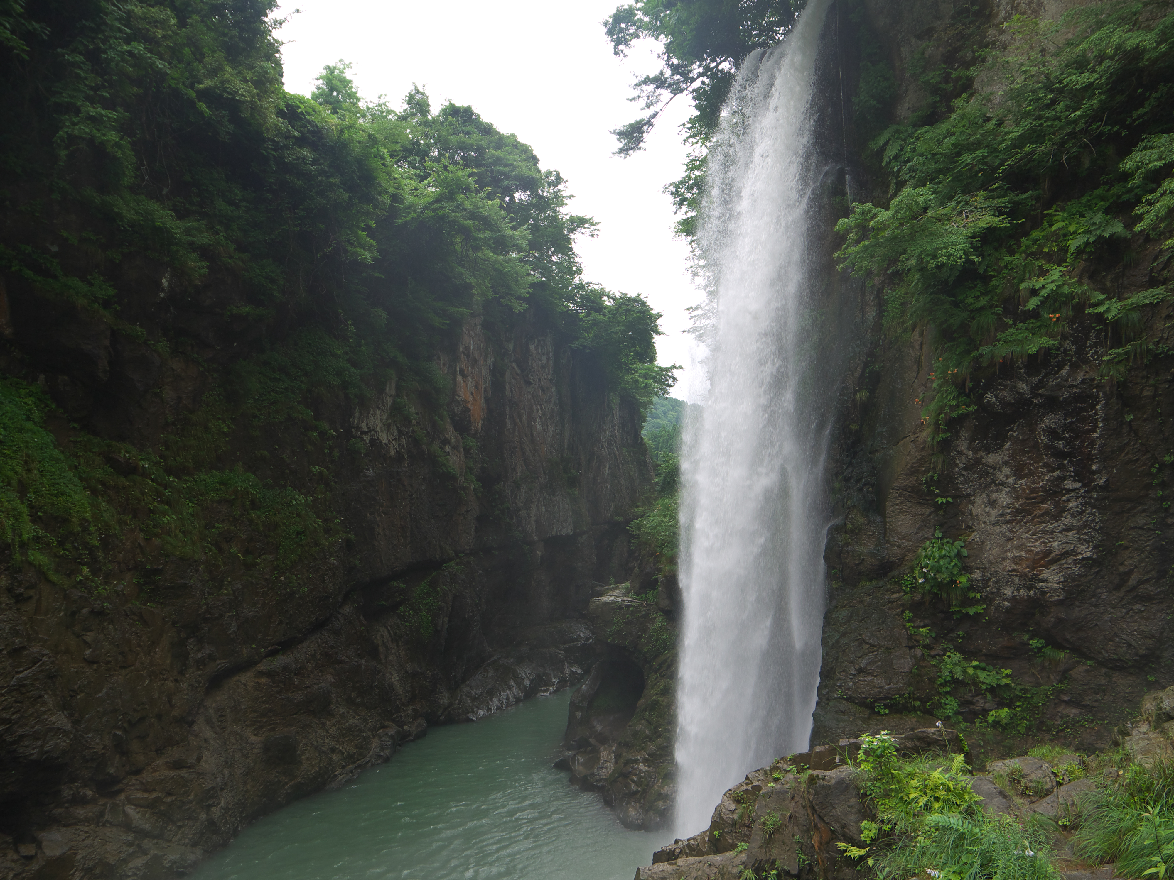 手取川の手取峡谷と綿ヶ滝